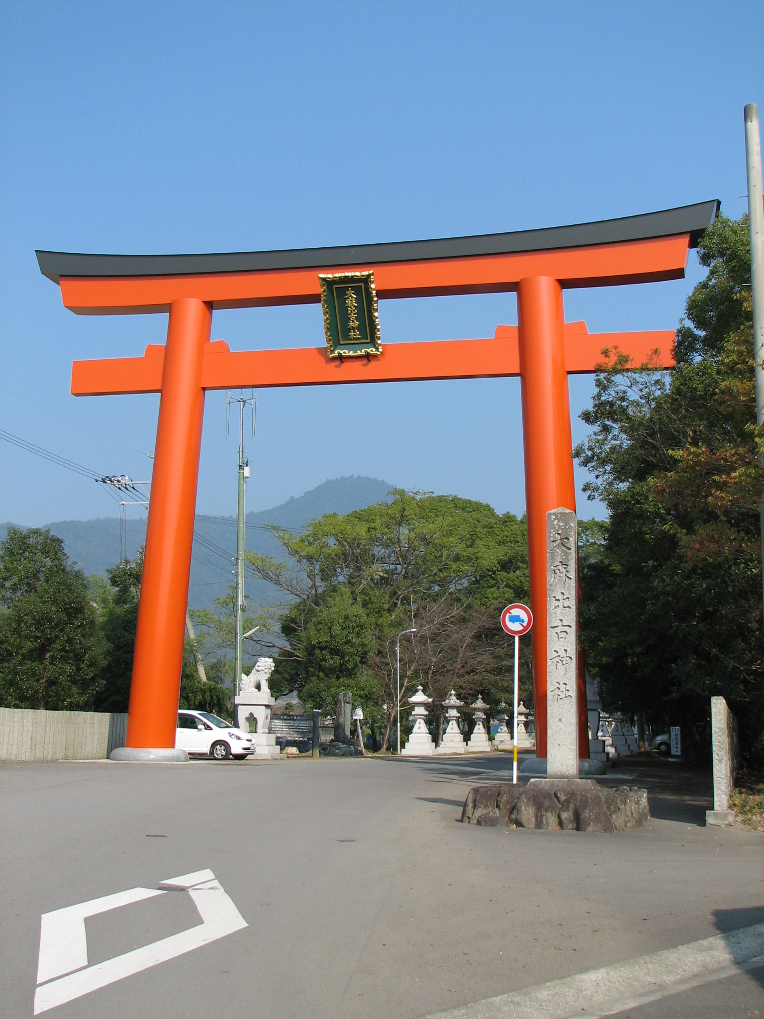 the torii gate in Ōasahiko-jinja, Naruto, Tokushima, Japan 大麻比古神社（徳島県鳴門市）鳥居